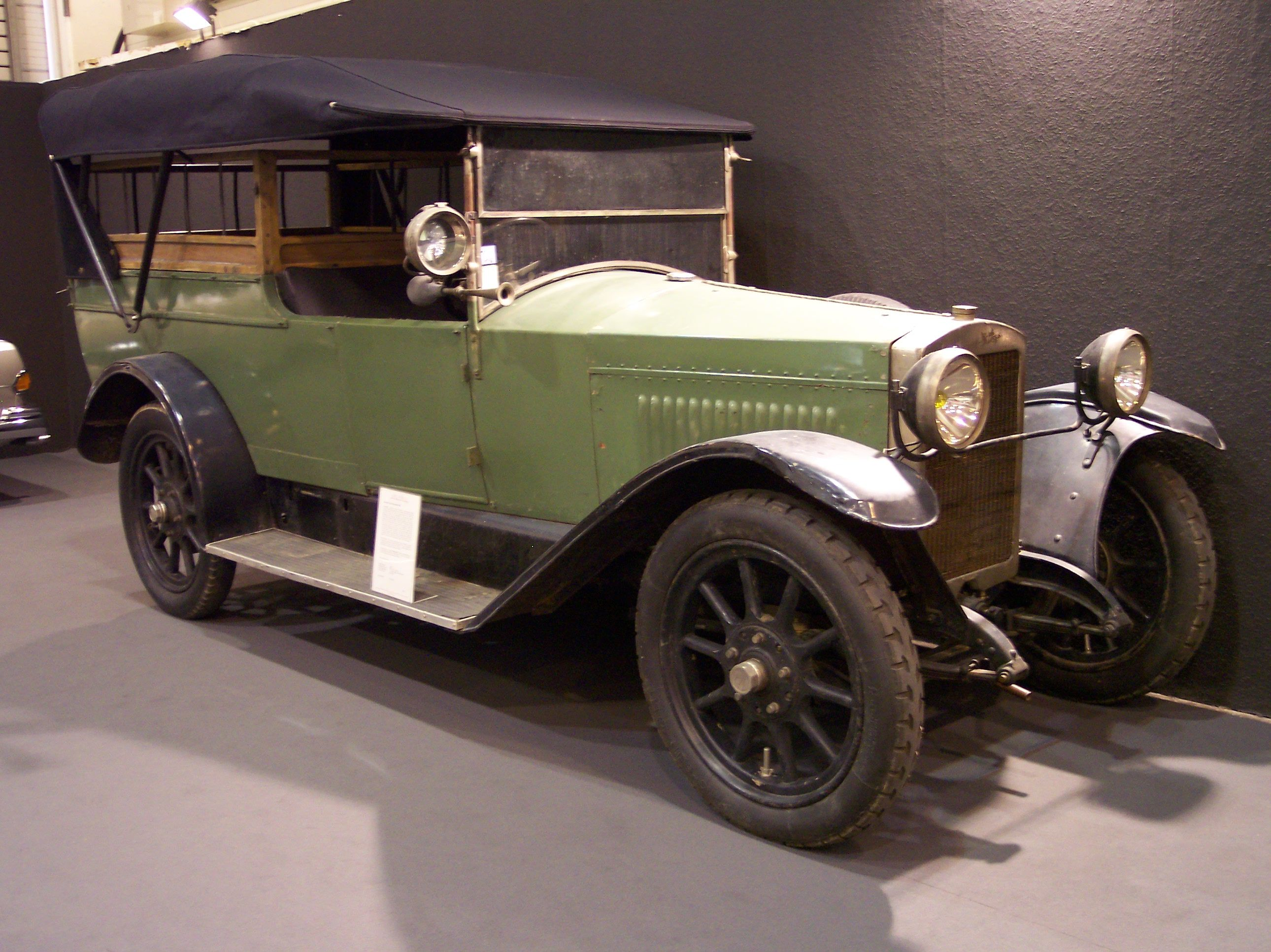 Vermorel Type X 1924 Normandie